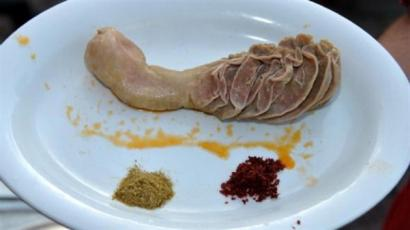 Qursaq dolması